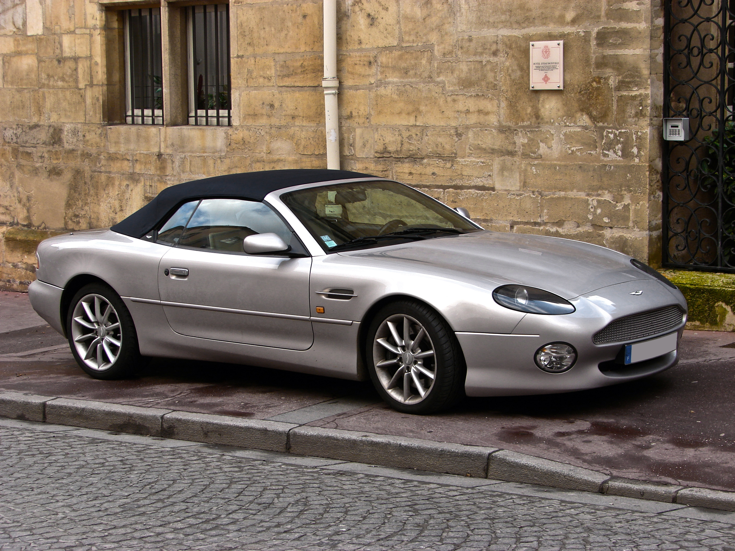 Aston Martin DB7 Vantage Volante